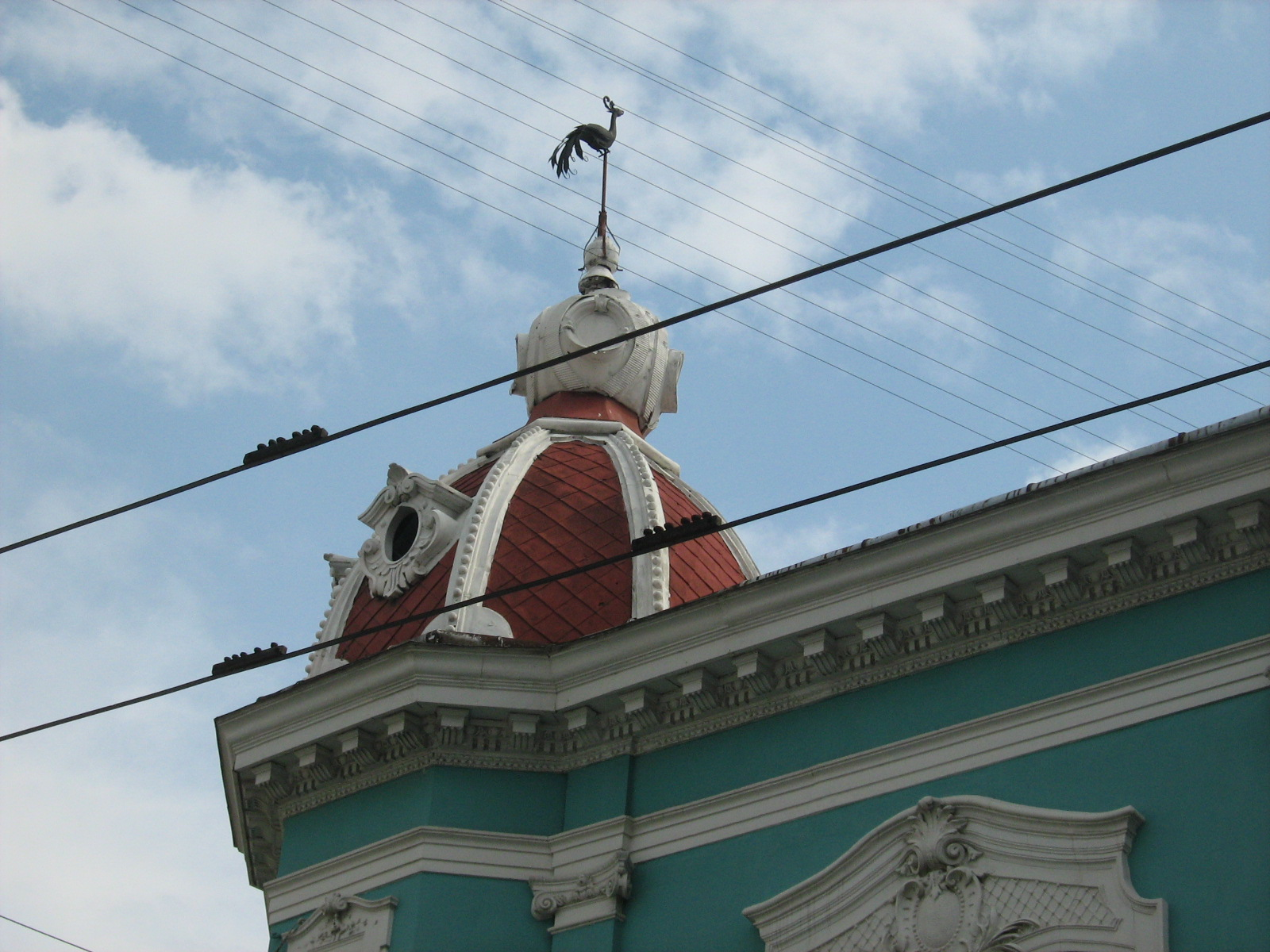 Купол на будівлі медичного університету, що є пам'яткою архітектури місцевого значення, вул. Руська, 36 у Тернополі.